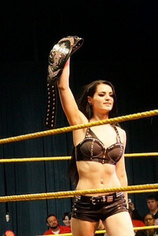 2014-04-05_14-20-09_NEX-6_DSC08243